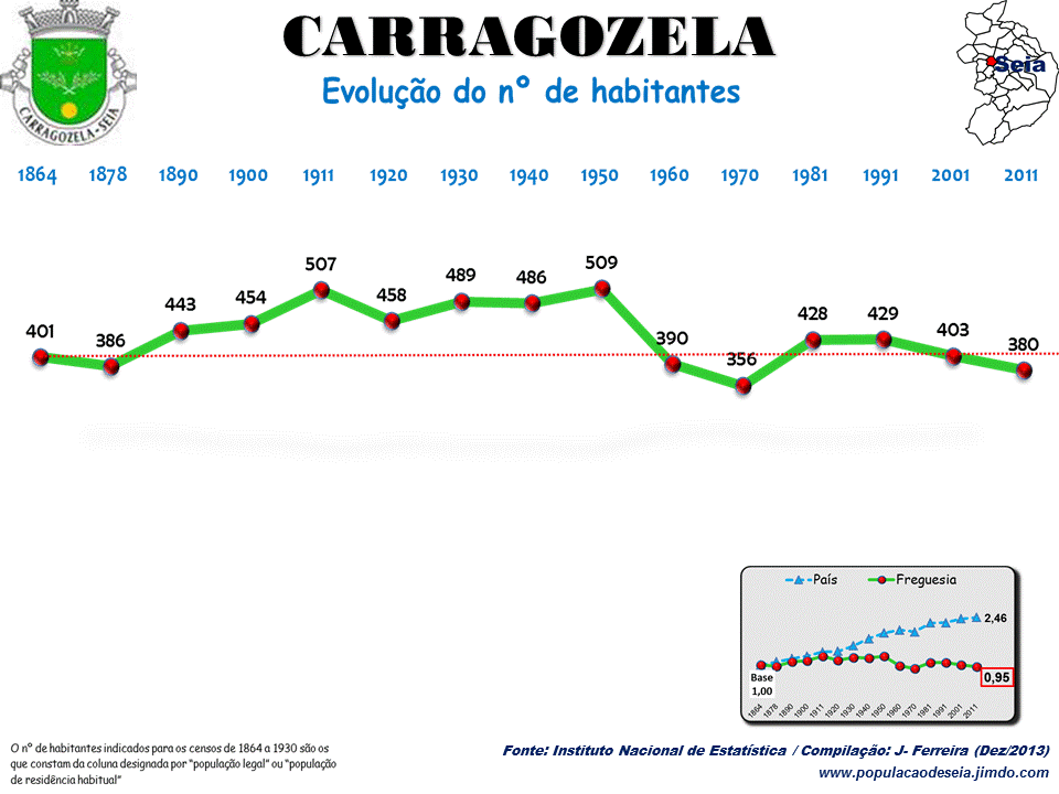 Evolução da População 1864 / 2011